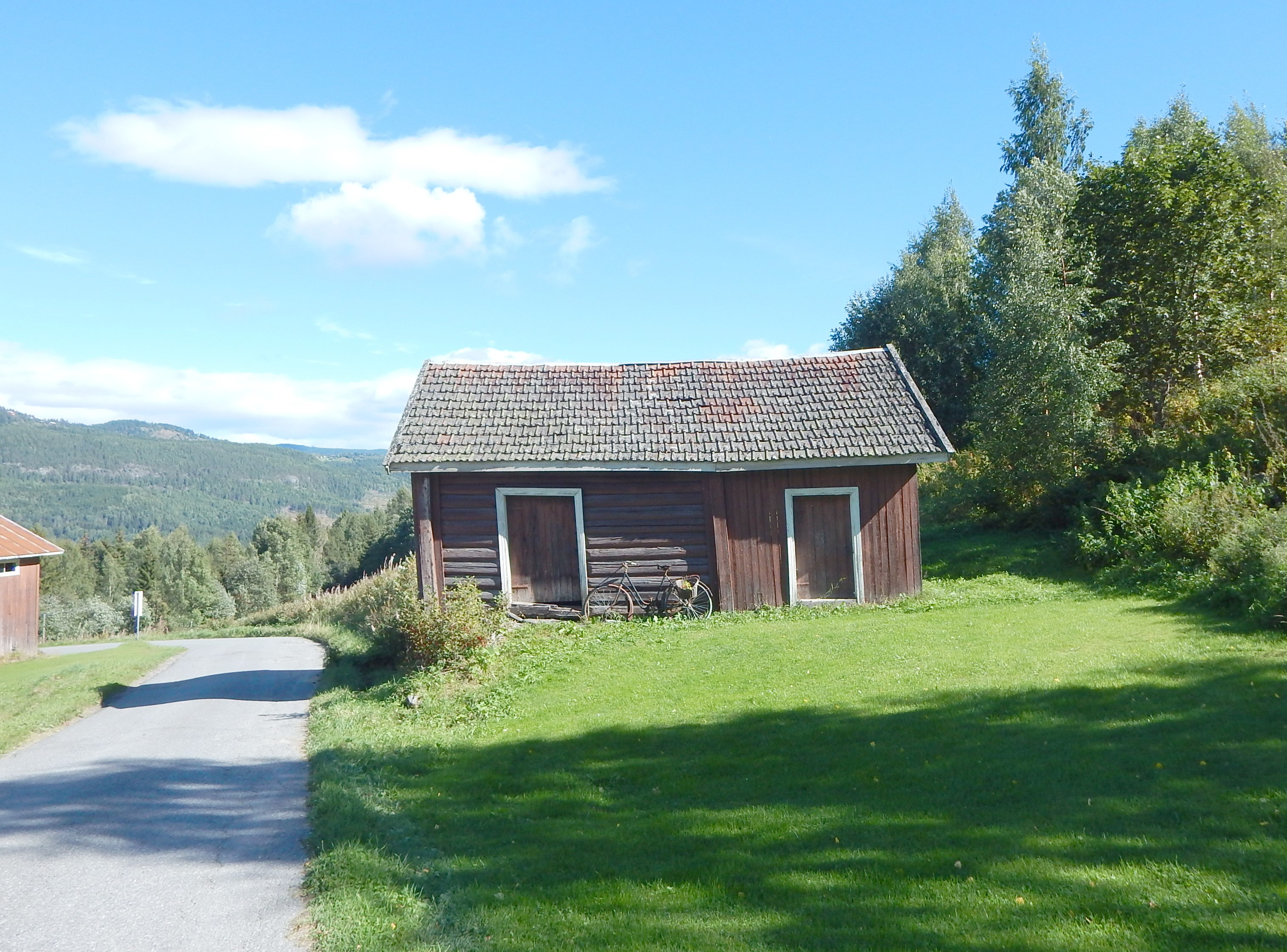 Nordsinni, ikke langt fra den nedlagte stasjonen